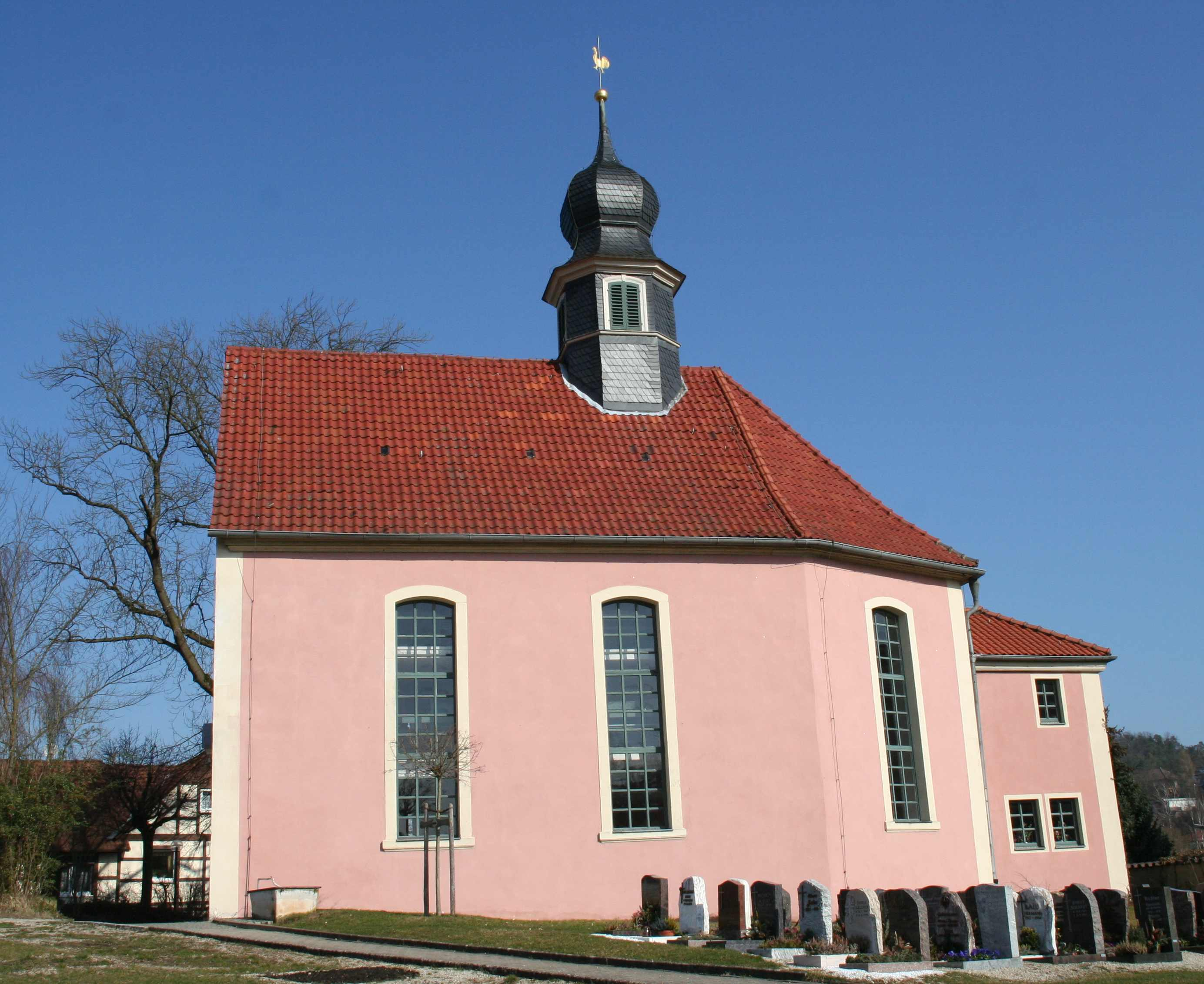 ev. Kirche in Weitramsdorf, Lkr. Coburg